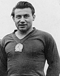 Budai László olimpiai bajnok magyar labdarúgó, edző, az Aranycsapat kiemelkedő jobbszélsője.